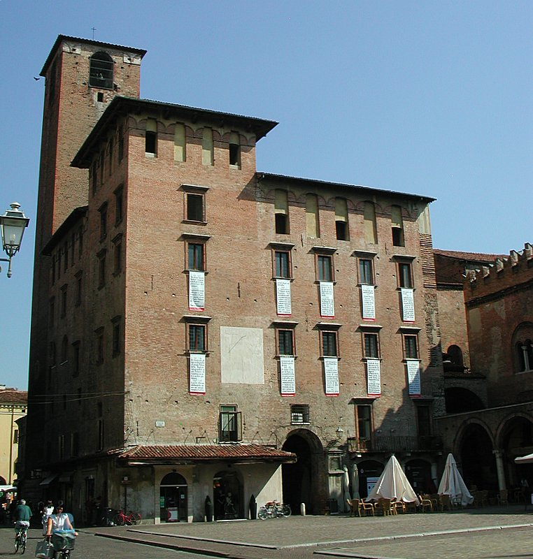 Palazzo del Podestà auf der Piazza delle Erbe di Mantova Source: photo uploaded by User:RicciSpeziari. Photographer: Riccardo Speziari